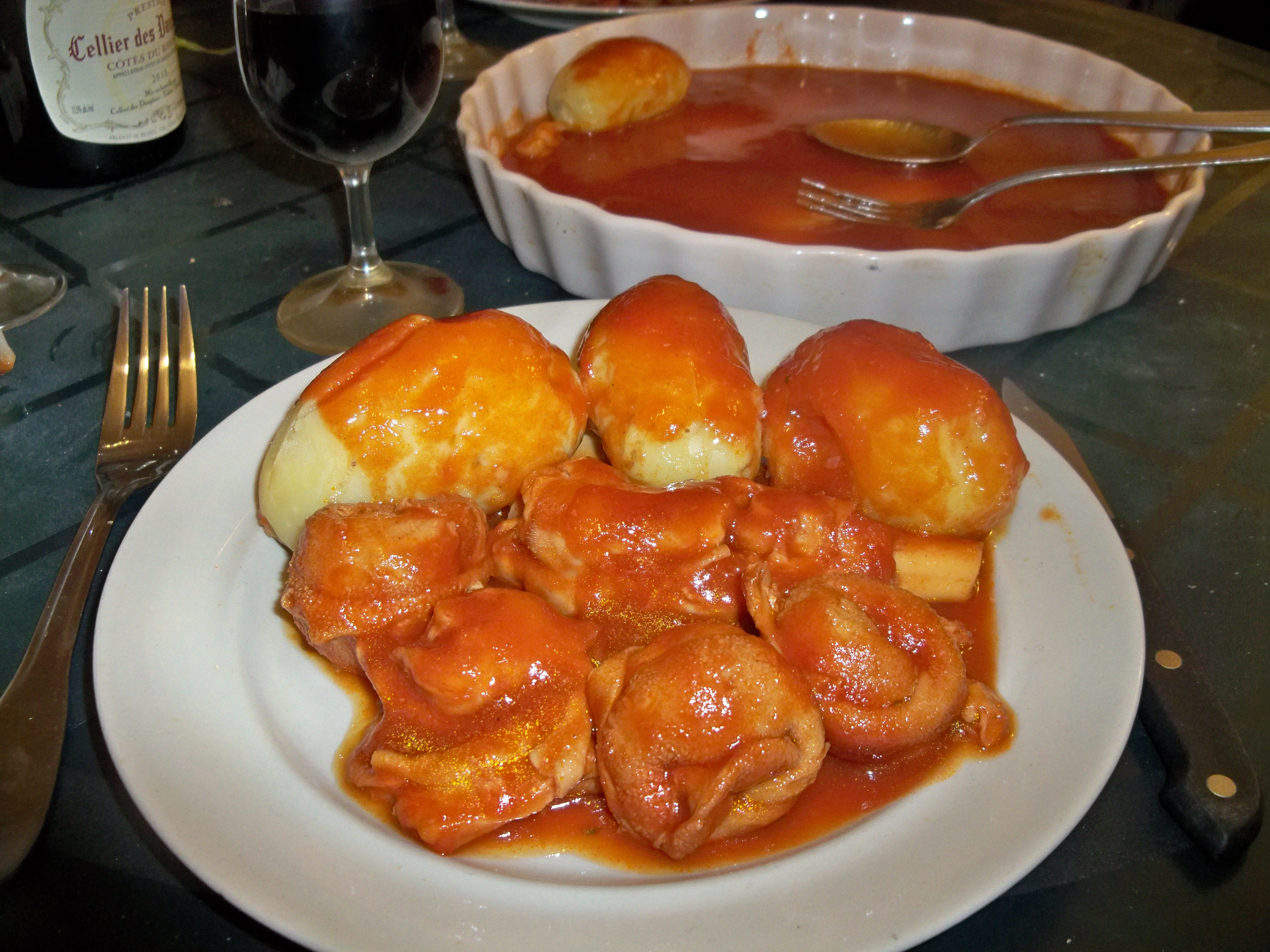 plat de pieds et paquets